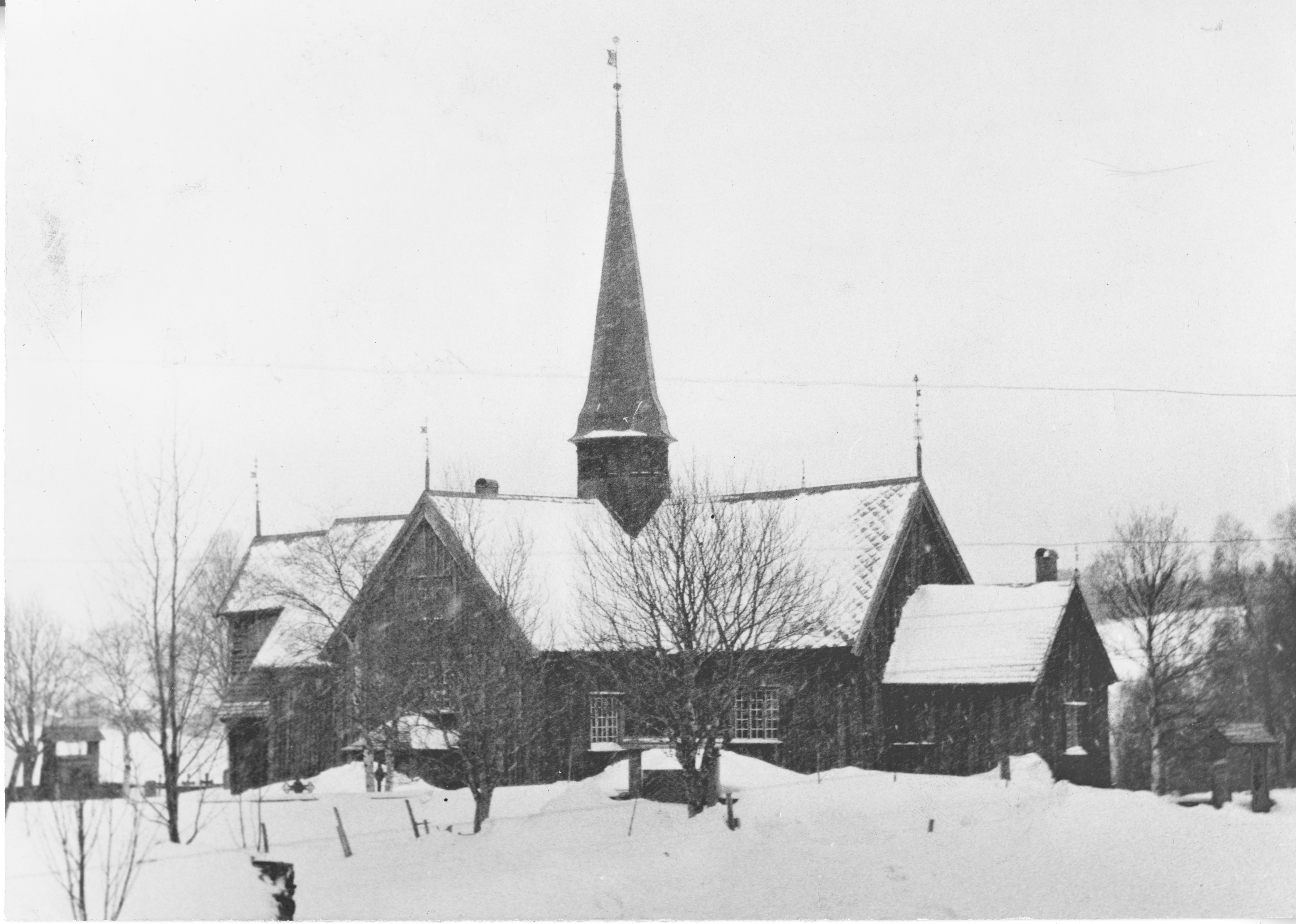 Rennebu church, Norway